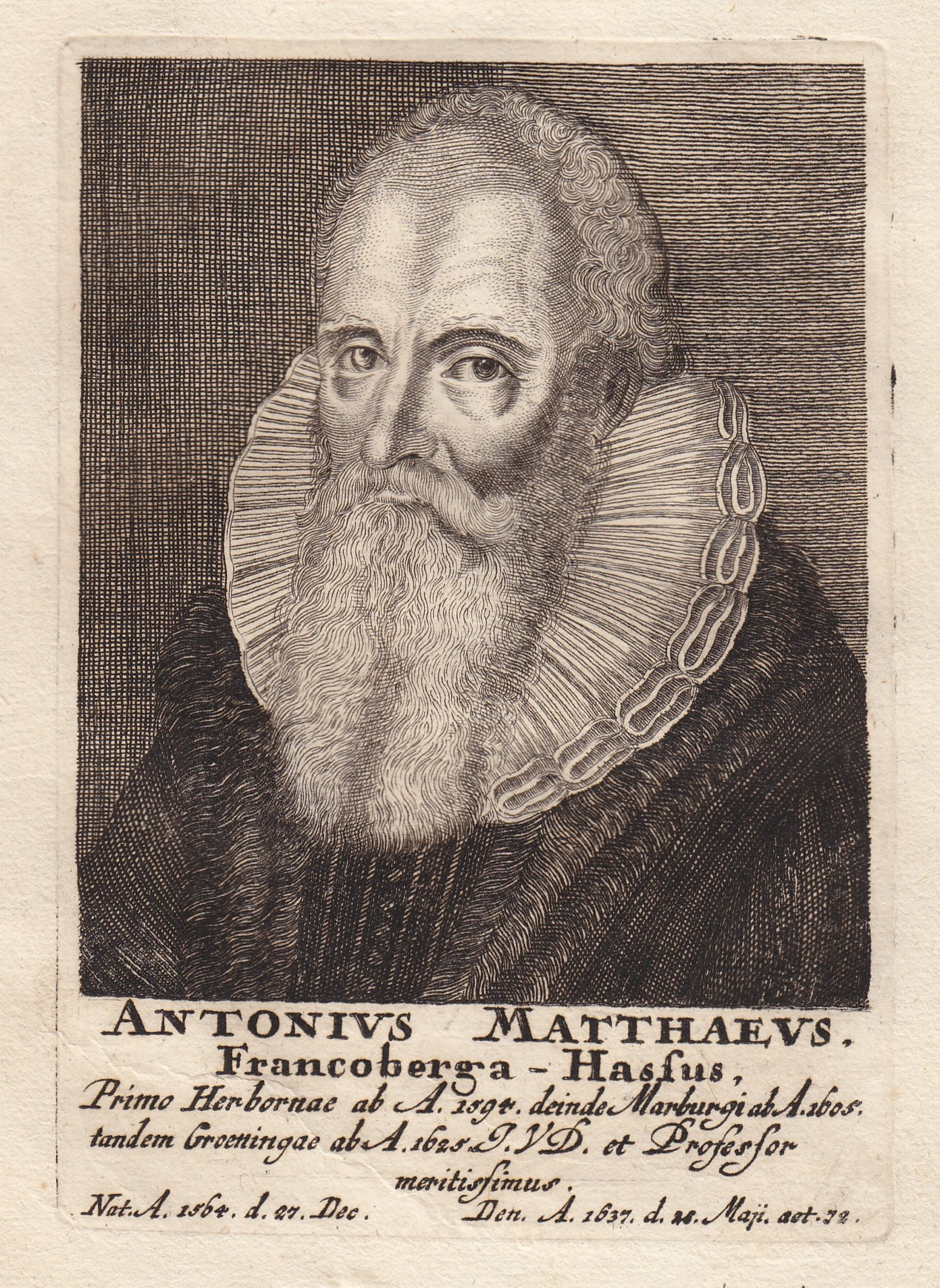 Kupferstich-Portrait von Anton Matthäus I. (1564–1637)